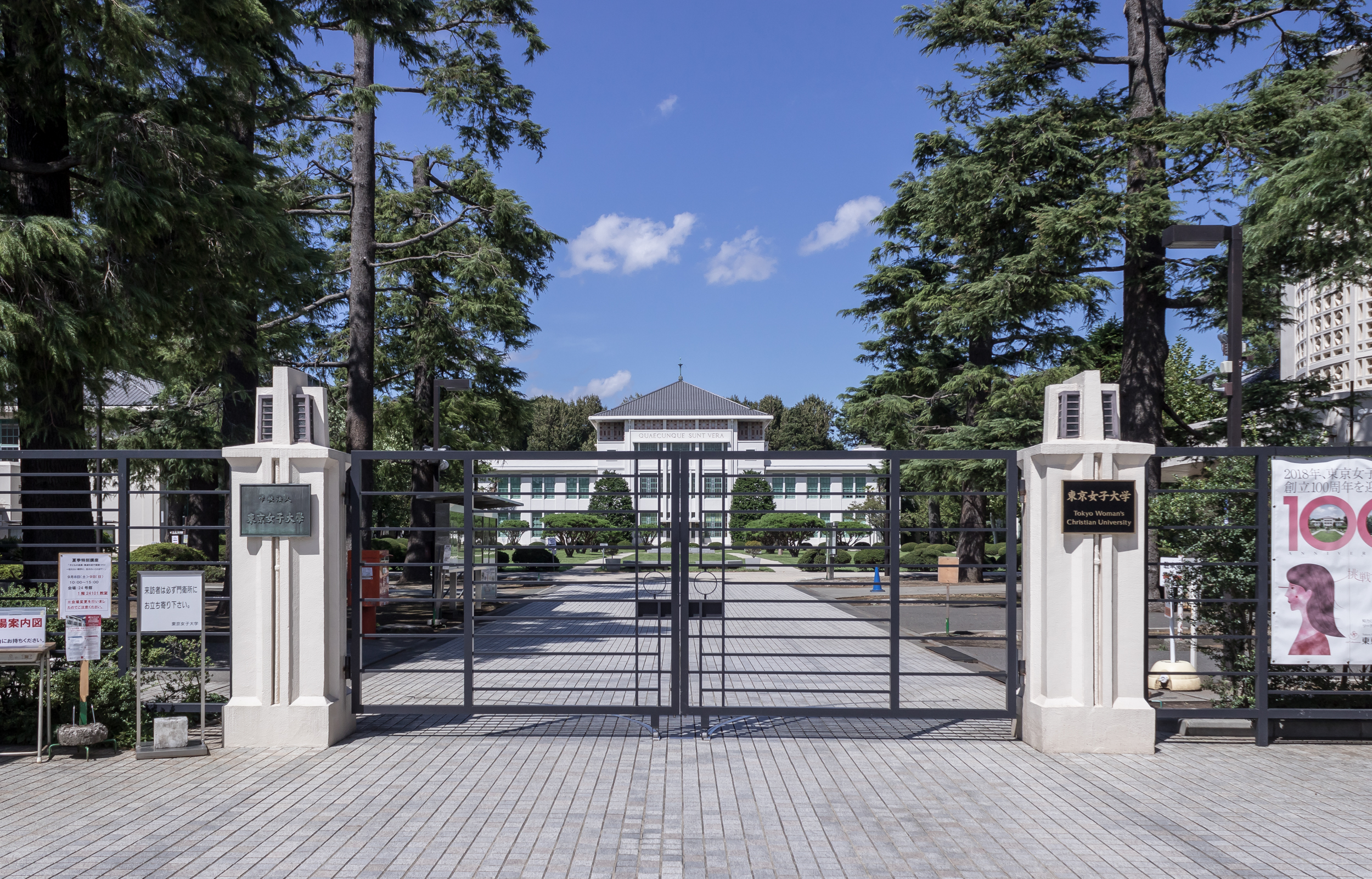 東京女子大学、善福寺キャンパス（東京都杉並区）。